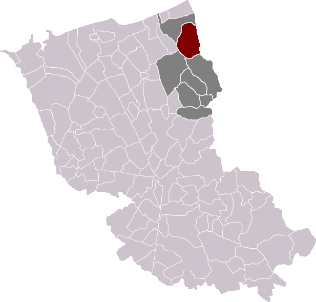 Locatie gemeente De Moeren in arrondissement Duinkerke. Zelfgemaakt. Location of Les Moëres municipality in the arrondissement of Dunkirk. Self made. Localisation de la commune des Moëres dans l'arrondissement de Dunkerque. Fait moi-même.